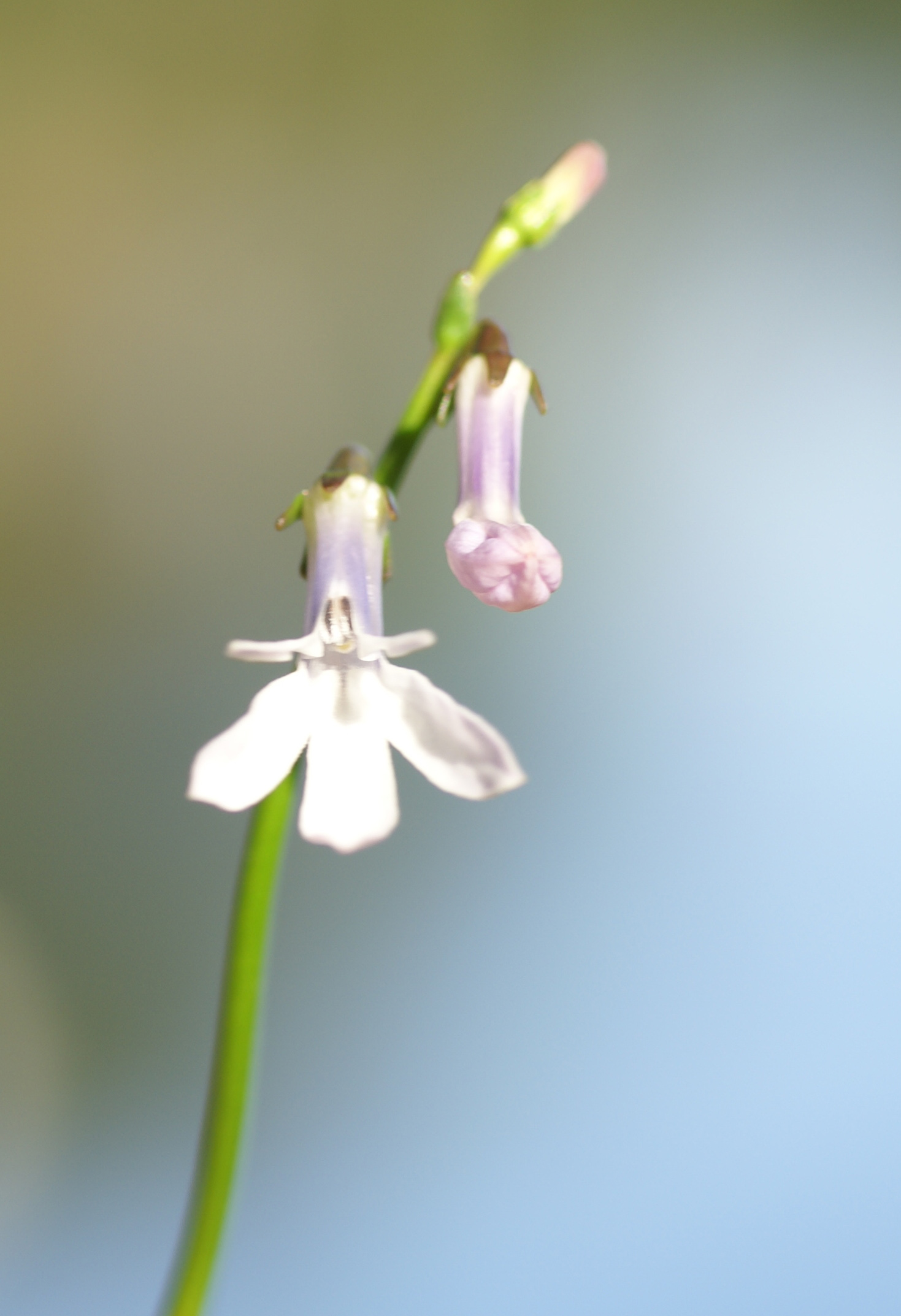 Plant species Lobelia dortmanna